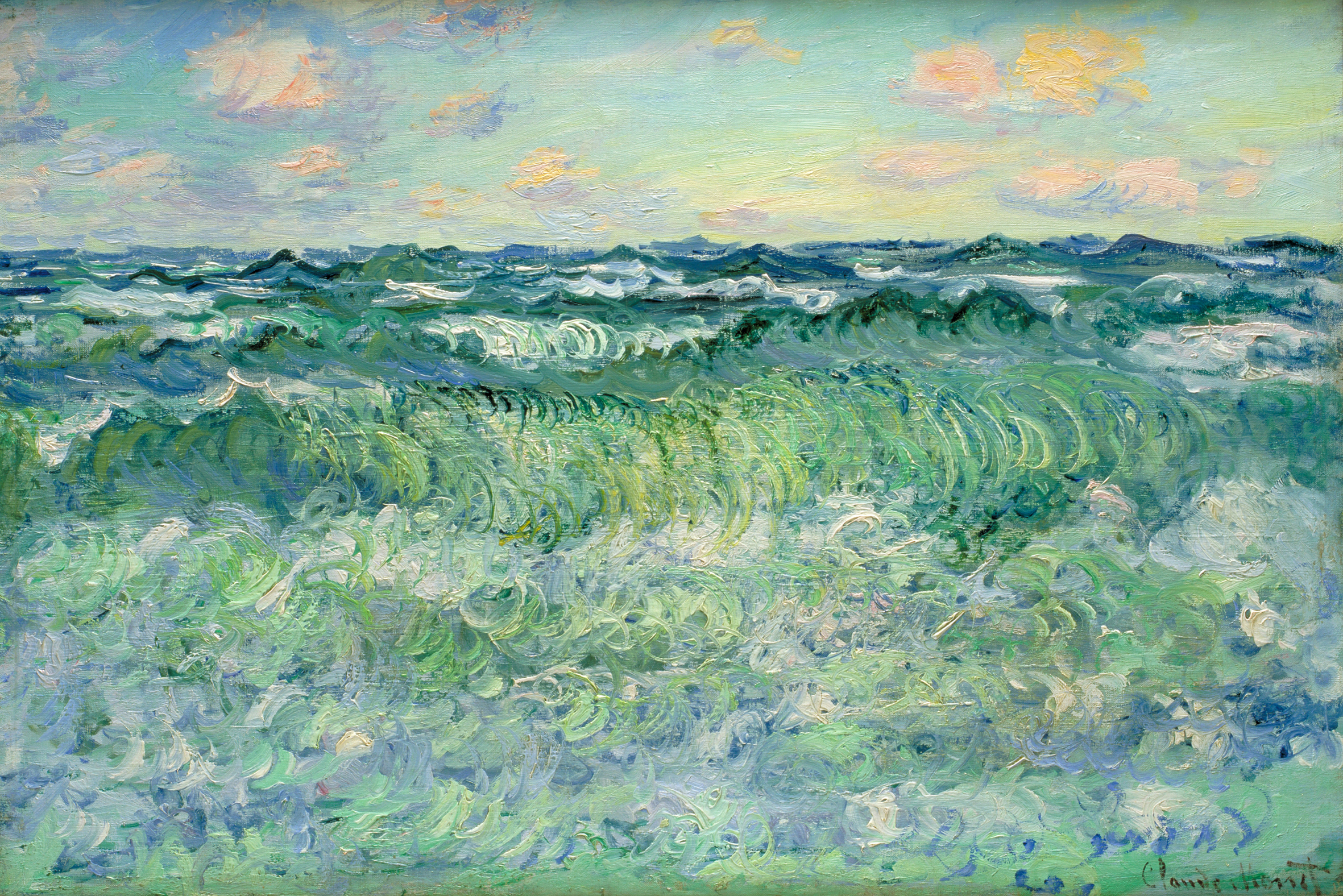 1881 olio su tela, 57 x 72,8 cm Conservation Départemental du Patrimoine et des Museès – Abbaye de Flaran – Coll. Simonow